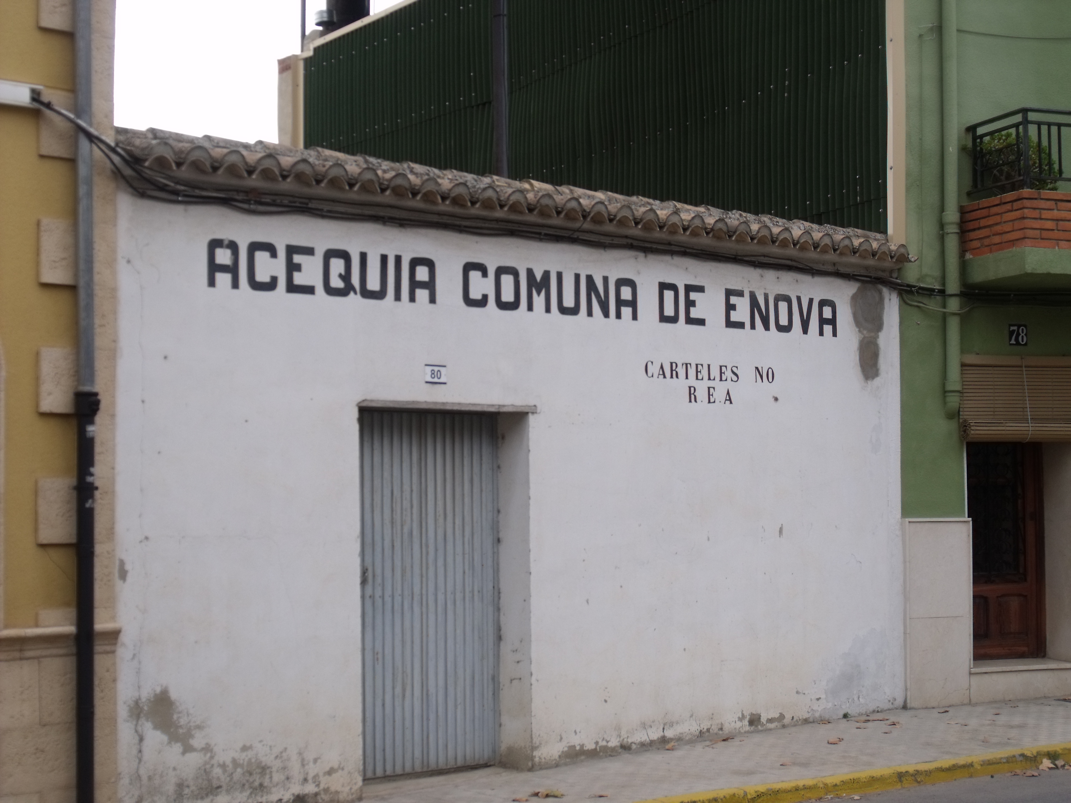 Edificio de la Acequia Comuna de Enova